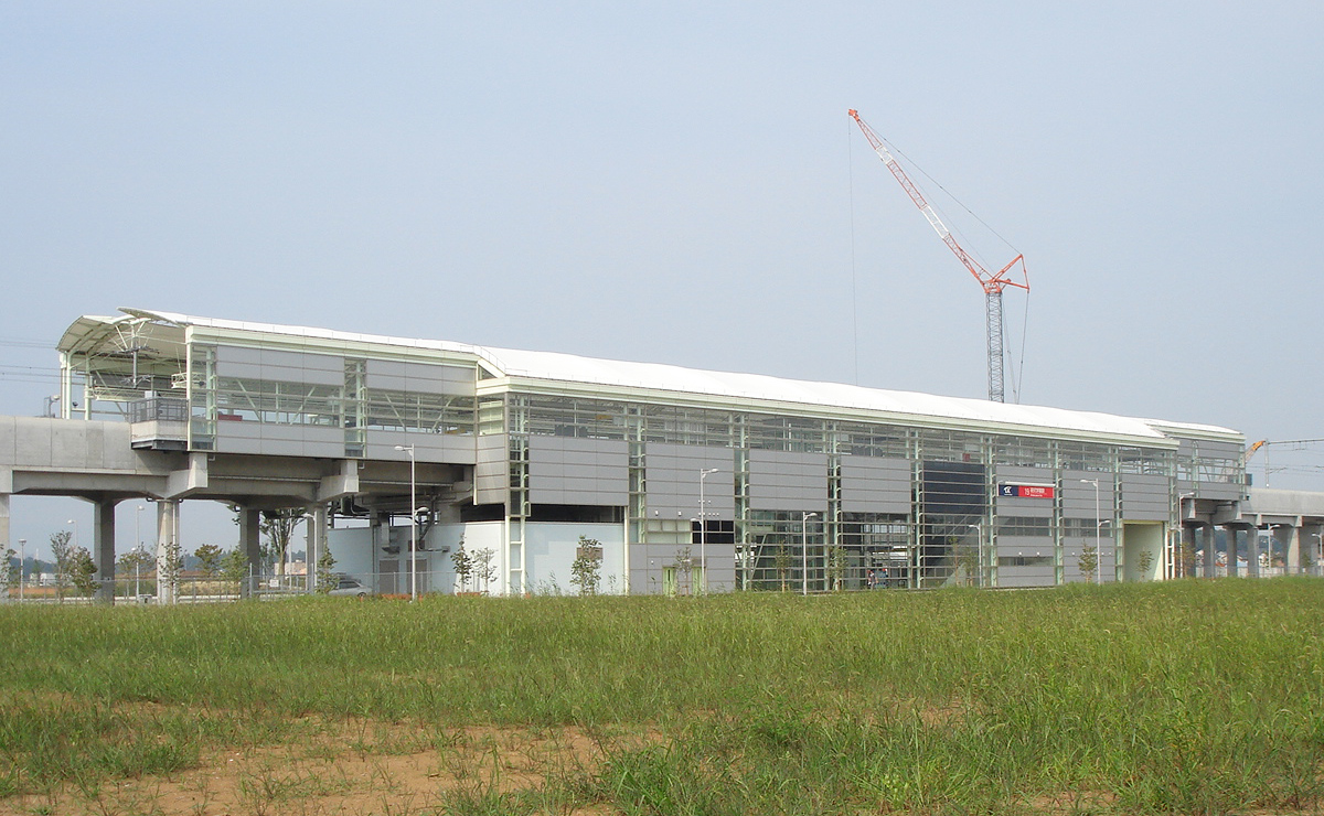 つくばエクスプレス研究学園駅